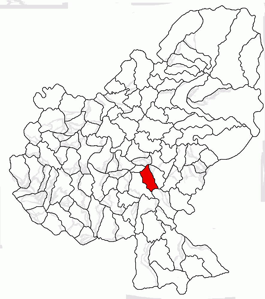 Categorie:Hărţi ale judeţului Mureş